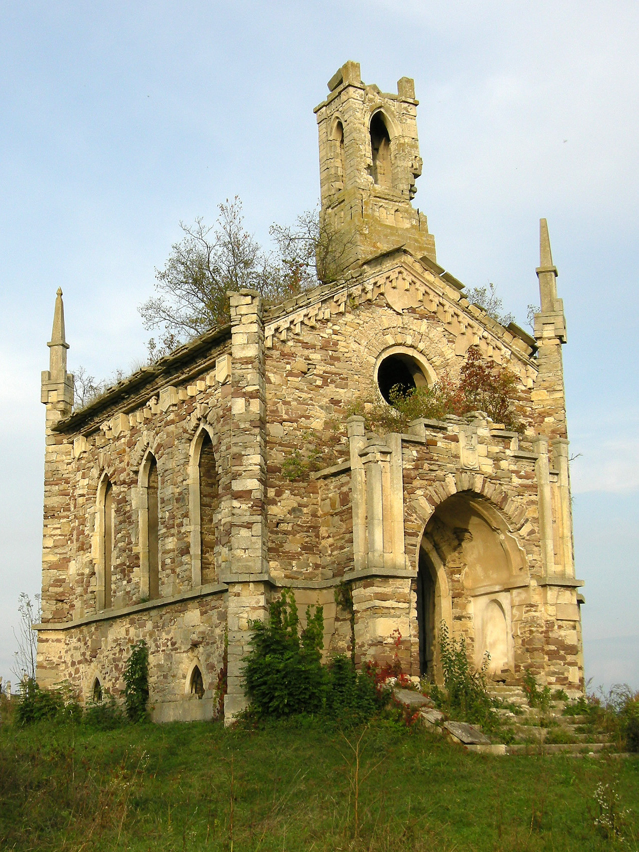 Каплиця XIX ст. (мур.) на кладовищі села Язловець Бучацького району Тернопільської області.